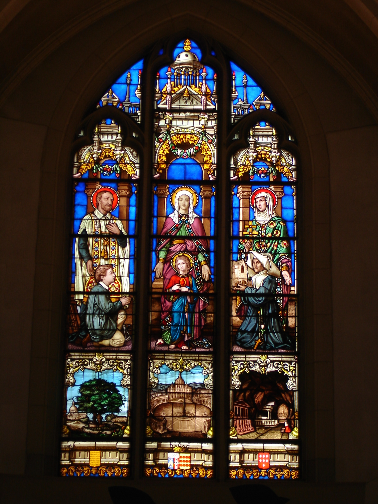 Église Sainte-Rosalie, boulevard Auguste-Blanqui, Paris XIIIe arrondissement. Signature: "Didron Paris"